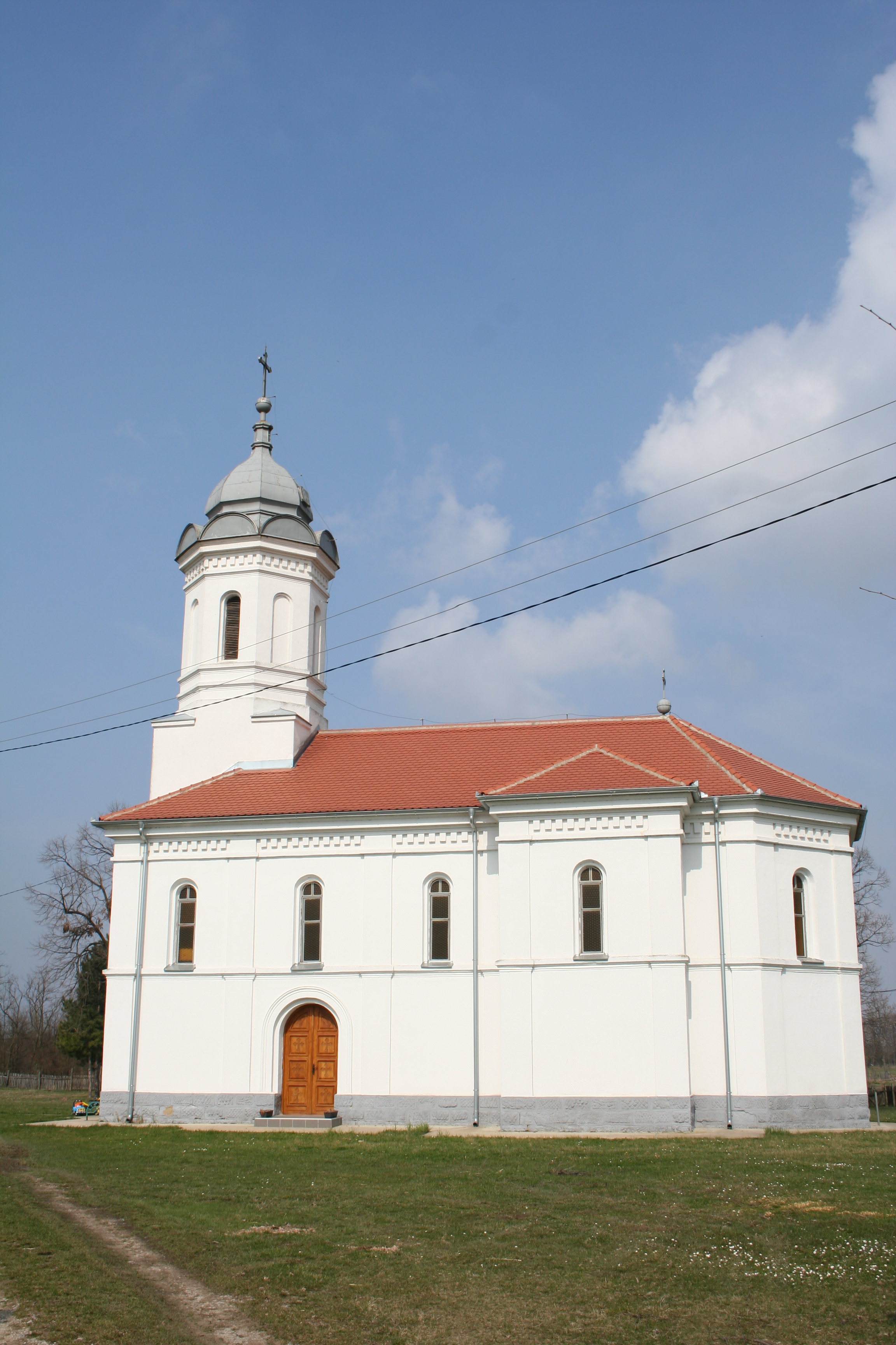 Stublenica, Crkva Sv Proroka Ilije